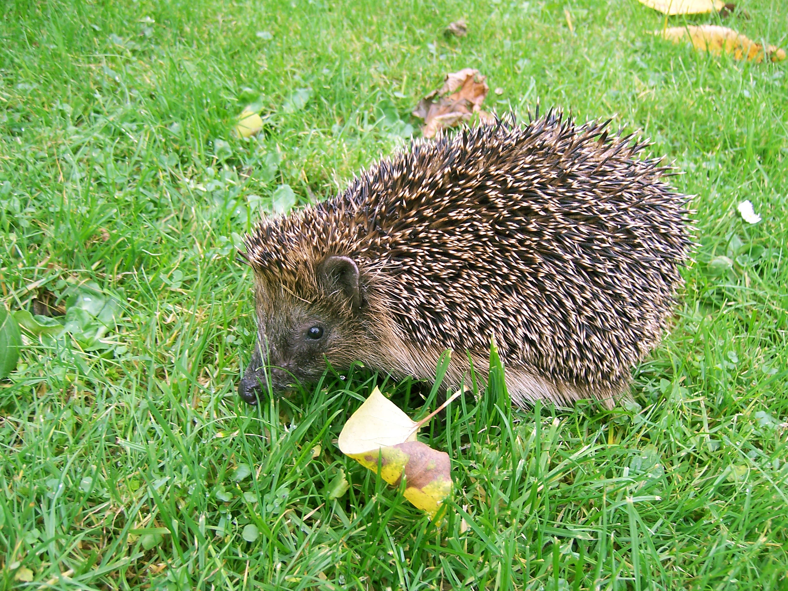 Stacheligel (Erinaceus europaeus) in Bremen